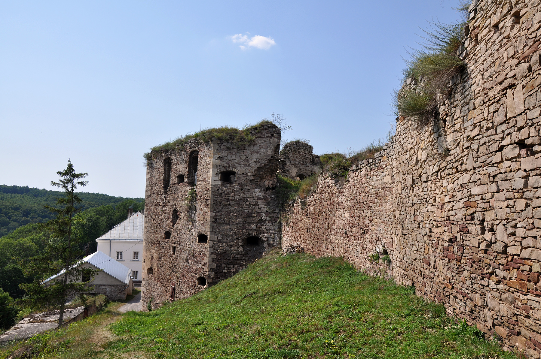 Замок (мур.), село Язловець